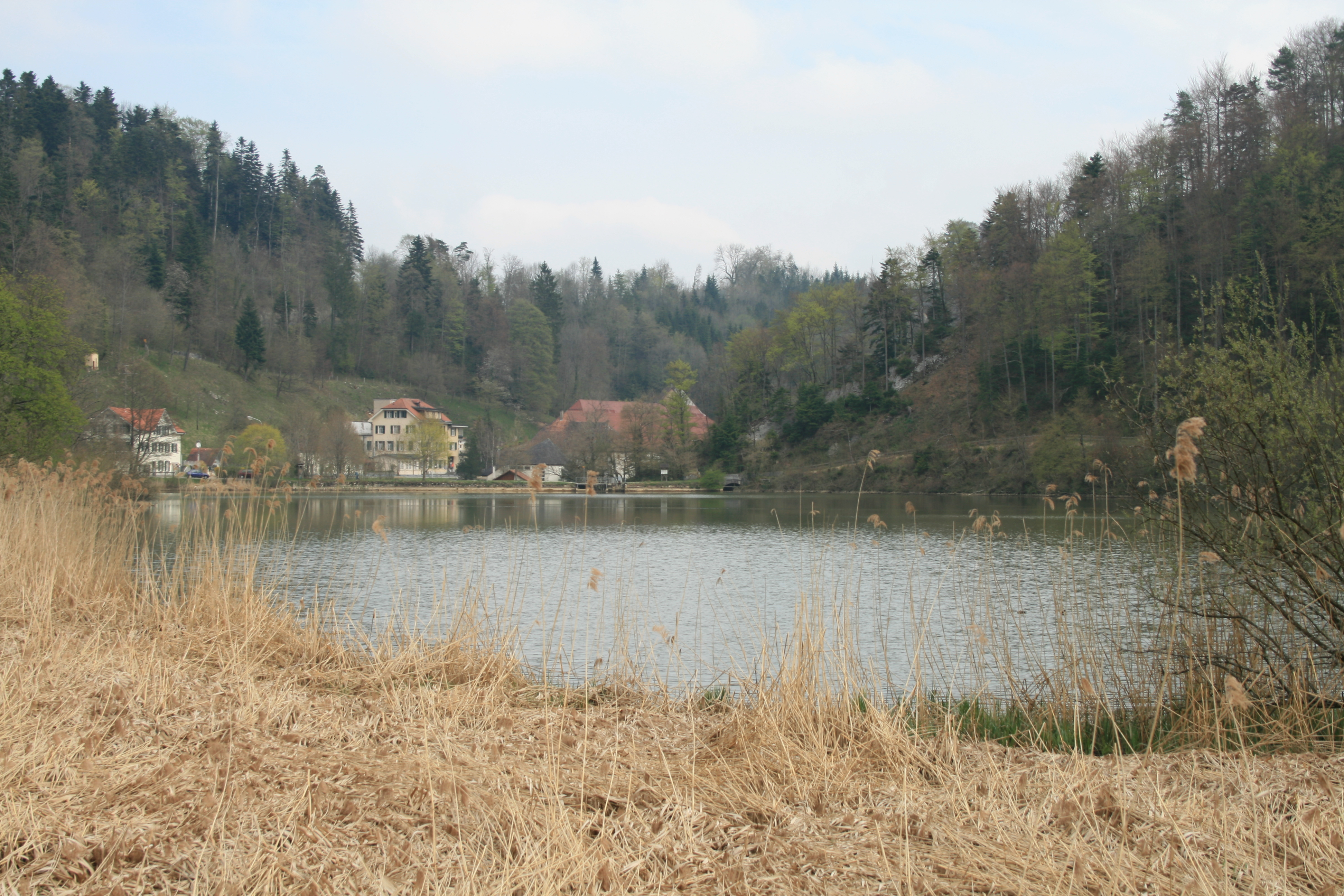 Lützelsee, Lucelle JU, Schweiz